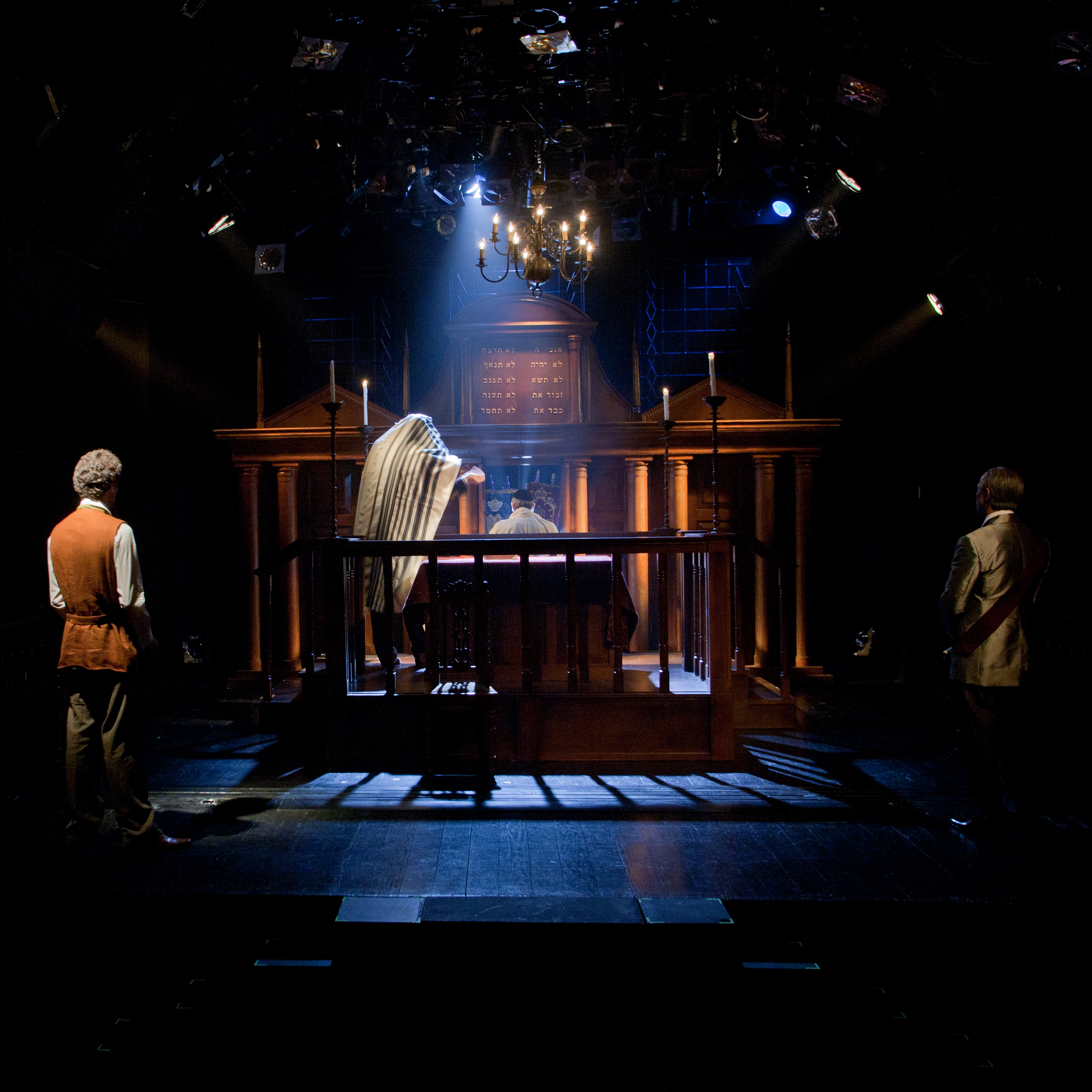 עיצוב תפאורה דנה צרפתי, עיצוב תלבושות דליה פן-הלר, ירושלים החדשה בבימויו של סיני פתר, תיאטרון החאן